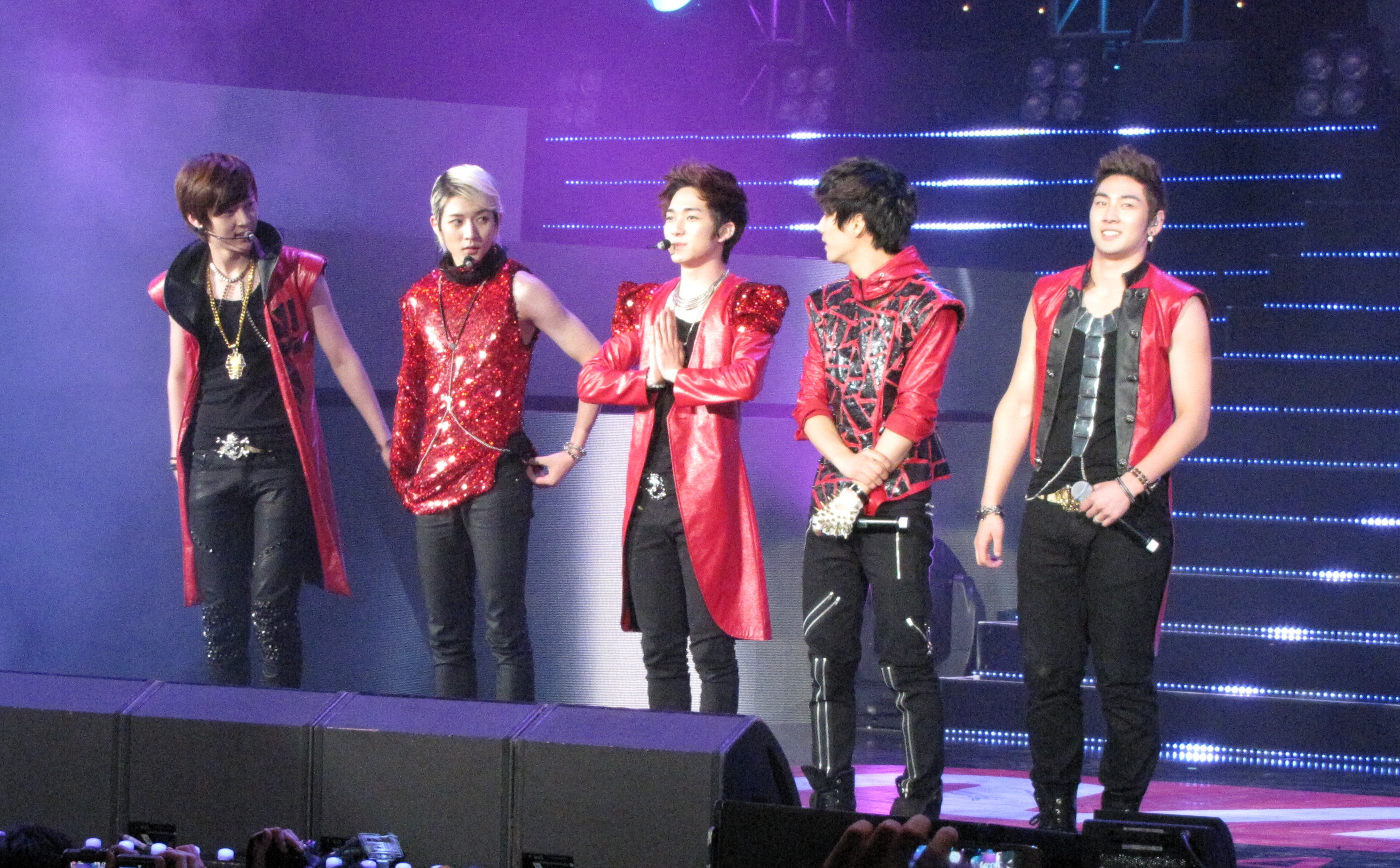 Nuest_2014.jpg